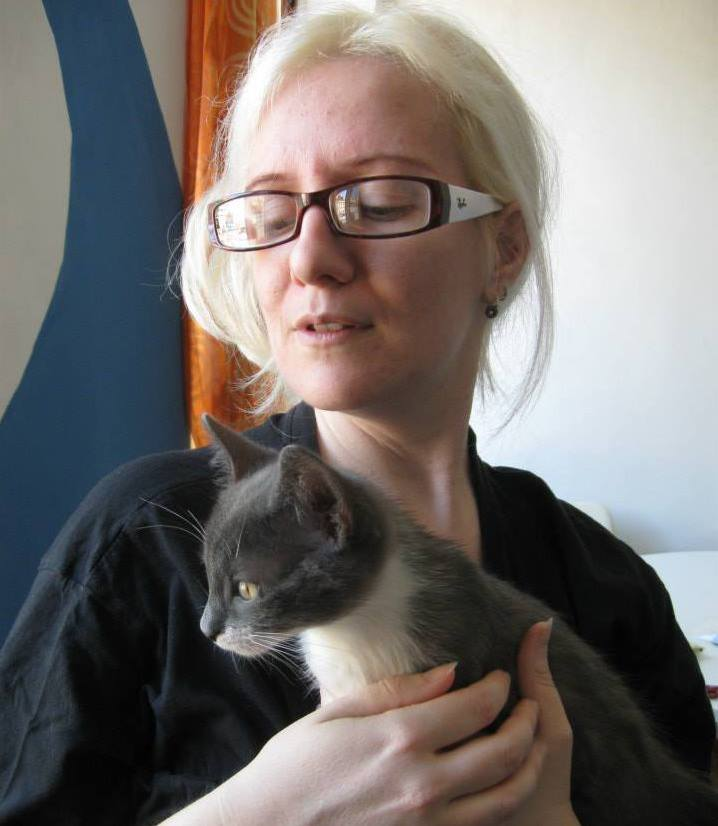 Foto di Susanna Raule